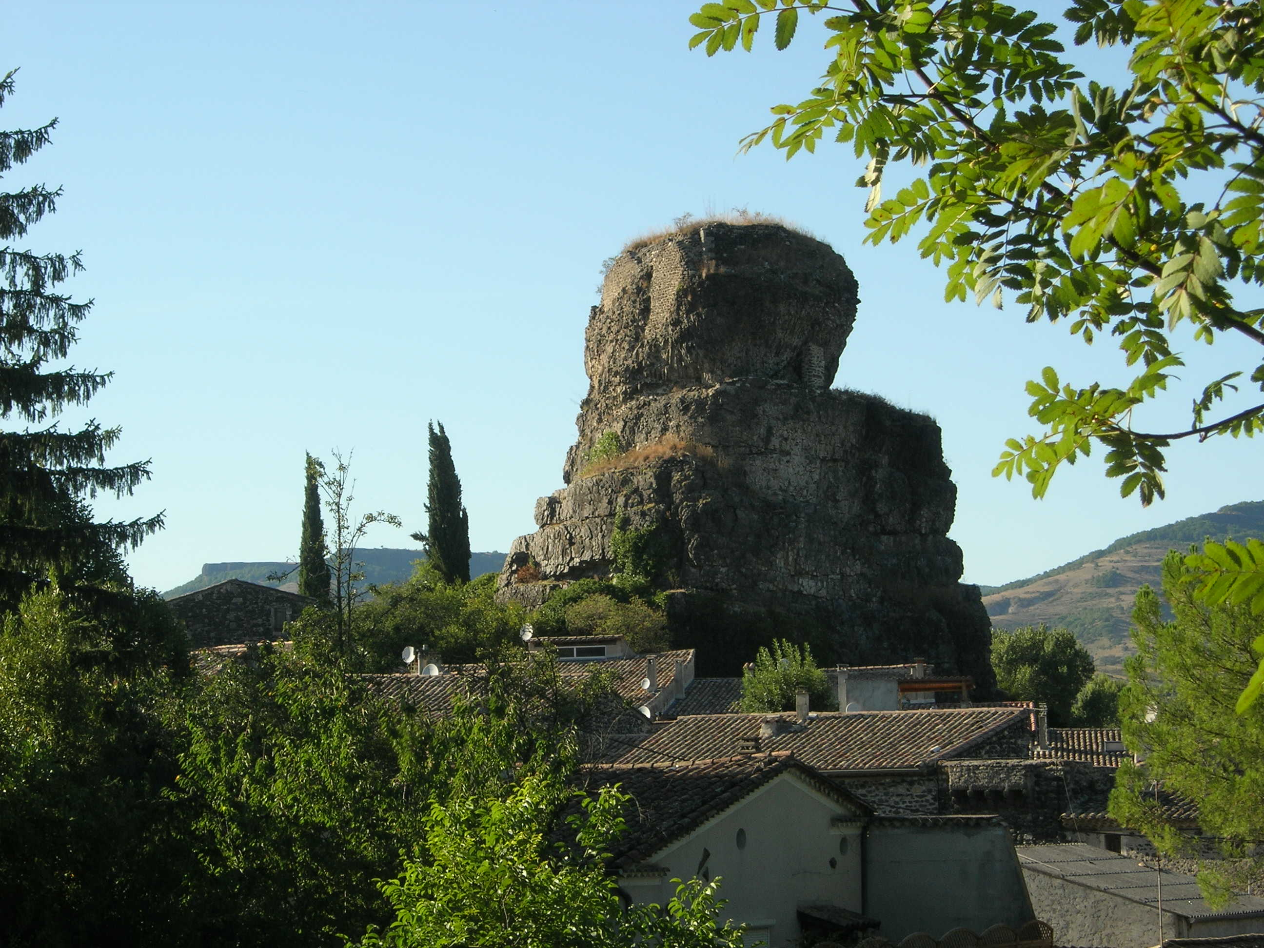 Maison du peintre chilien Eudaldo à La Roche d'Alba (Ardèche)